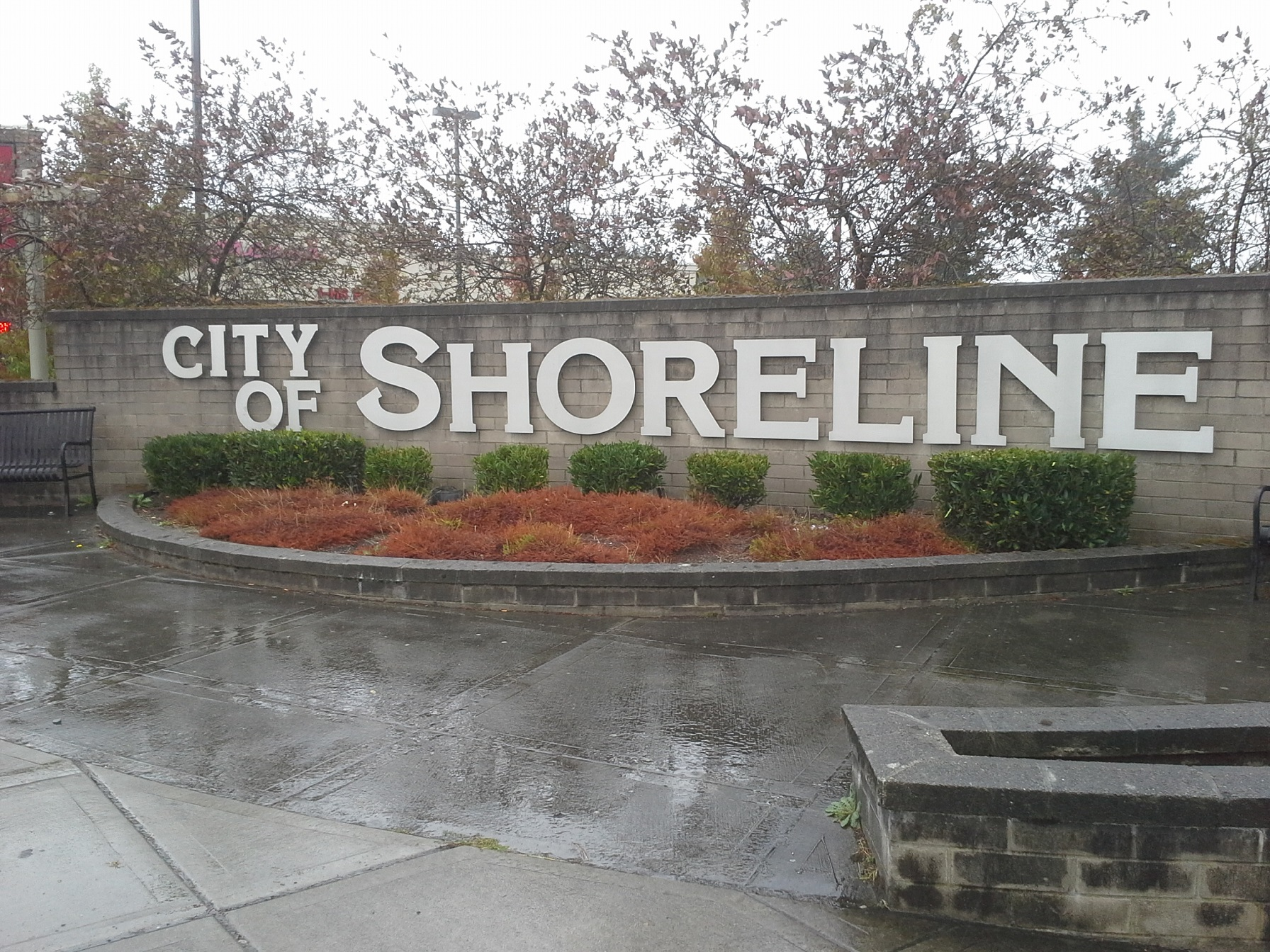 Salutafiŝo bonveniganta alvenantojn en Shoreline ĉe la seatla urblimo, N 145th St kaj Aurora Ave N